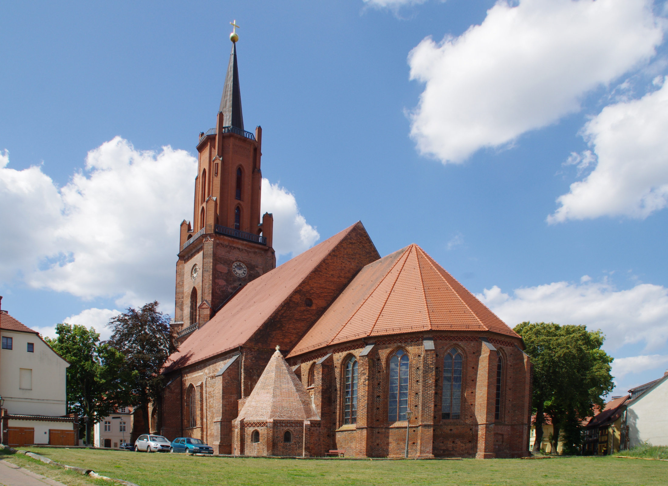 Rathenow in Brandenburg. Das Haus in der steht unter Denkmalschutz.